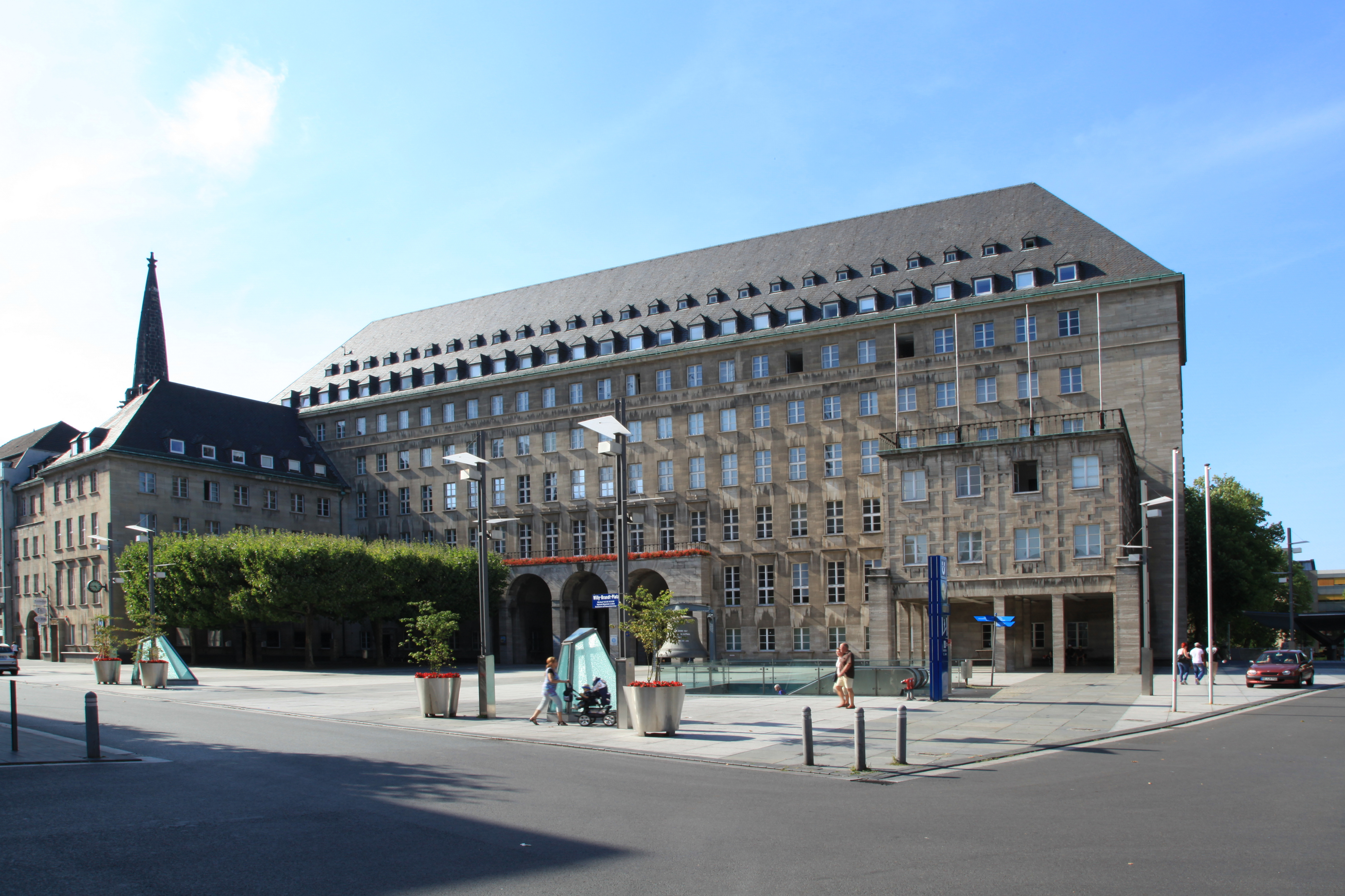 Willy-Brandt-Platz mit Rathaus in Bochum